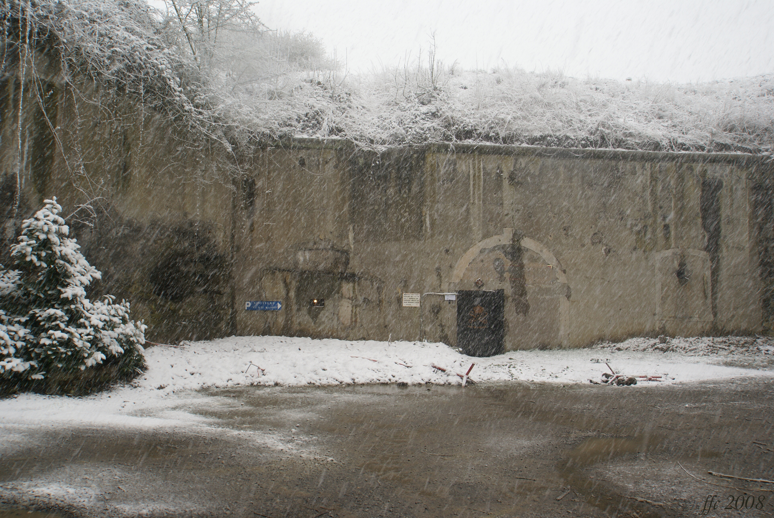 Fort de Flémalle (Belgium) Court Cort interior Cour intérieure Binnenkoer